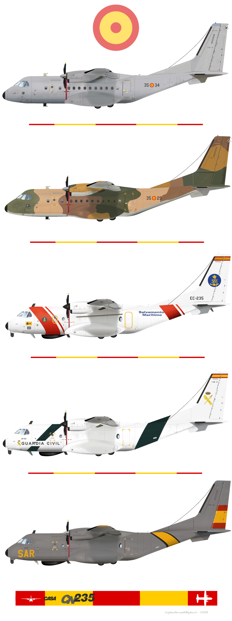 Casa CN 235 utilisés par Armée de l'Air Espagnole